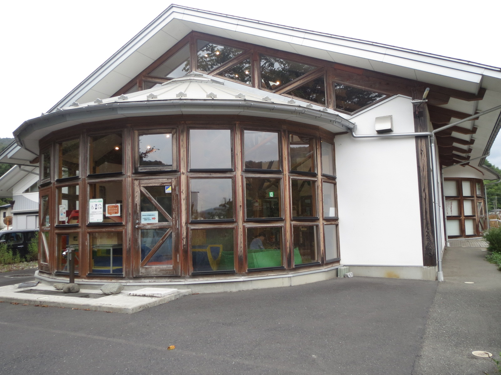 一関市にある太陽と風の家